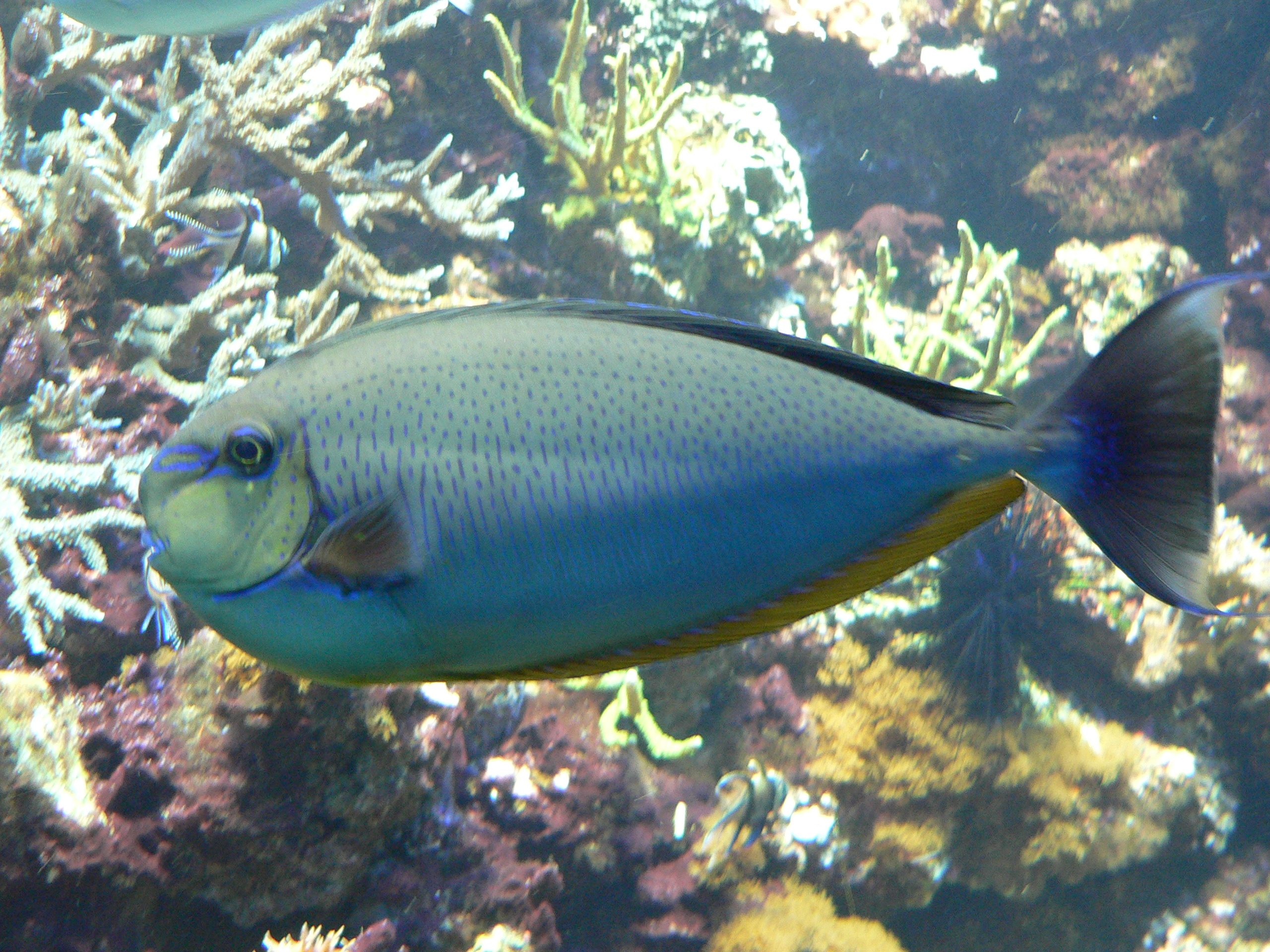 Masken-Nasendoktorfisch (Naso vlamingii) – normal